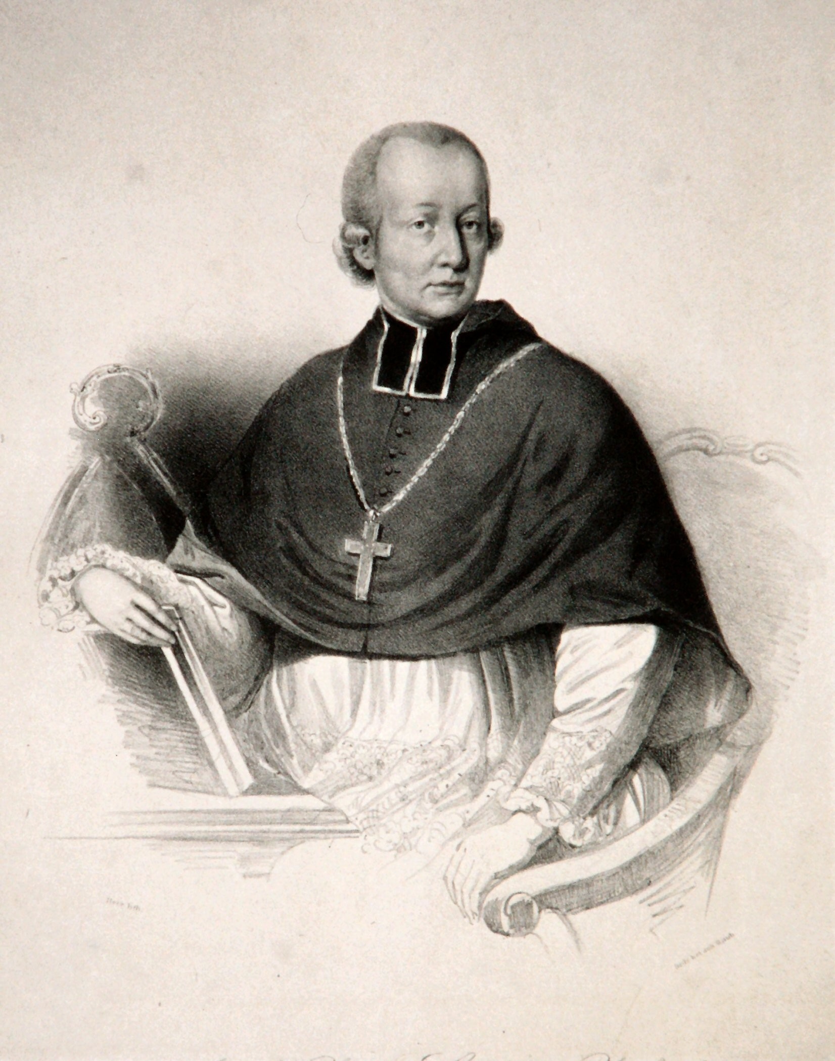 Josef Adam hrabě Arco (1733 – asi 1802), Římskokatolický kněz a královéhradecký biskup, Lithographie von Faustin Herr.